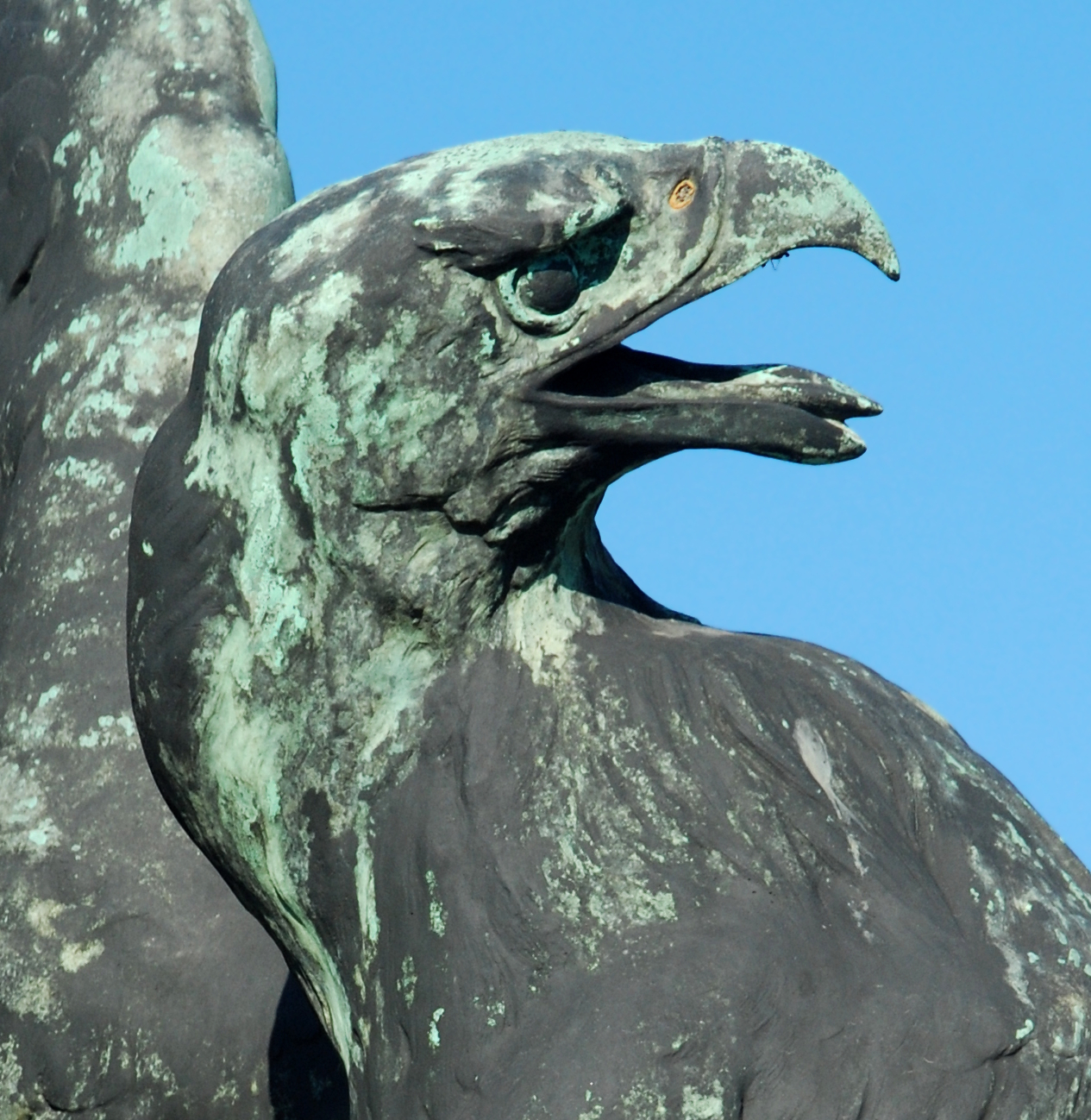 Belgique - Brabant wallon - Lasne - Plancenoit - L'Aigle blessé (bataille de Waterloo)